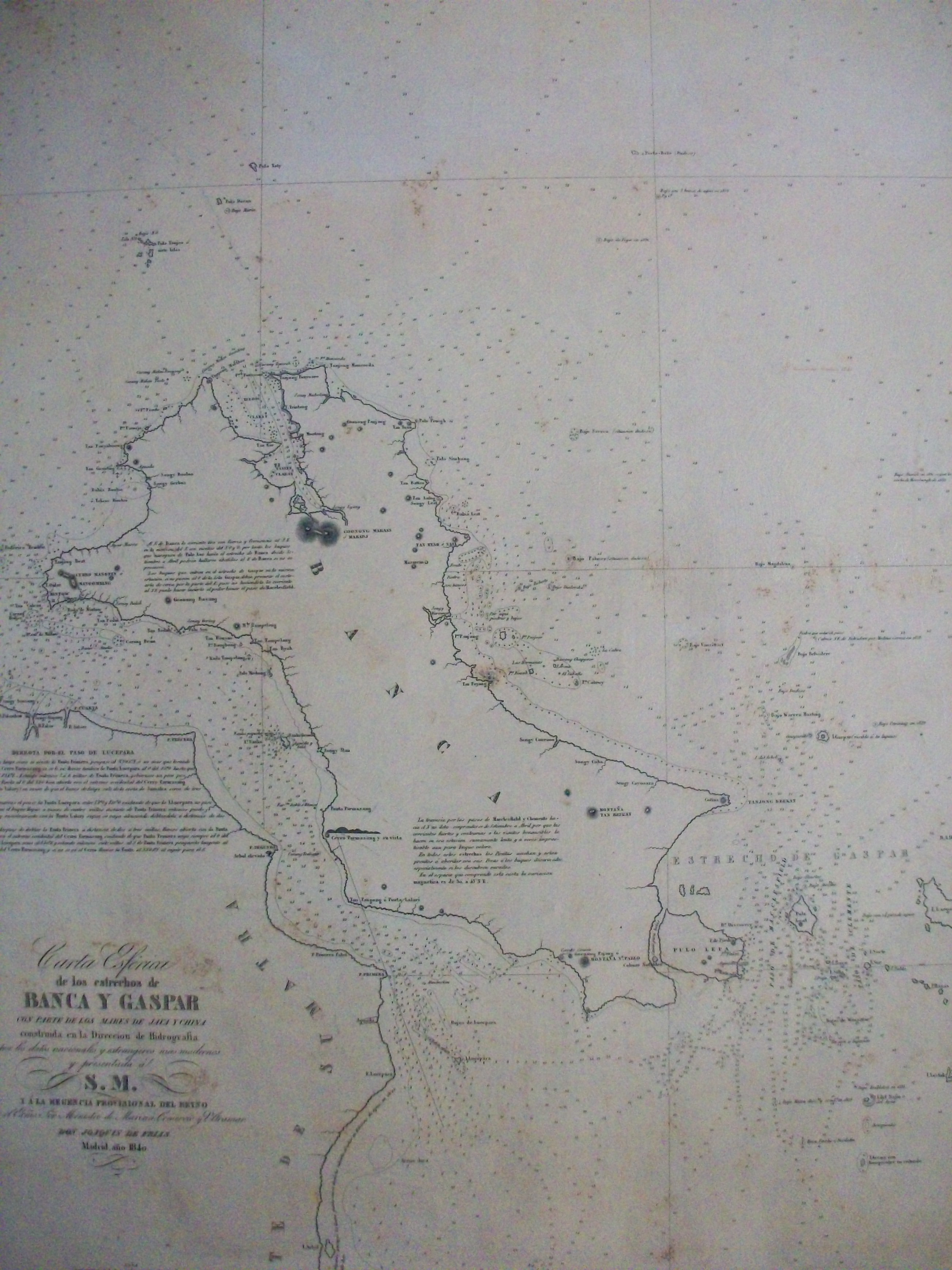 Carta nautica